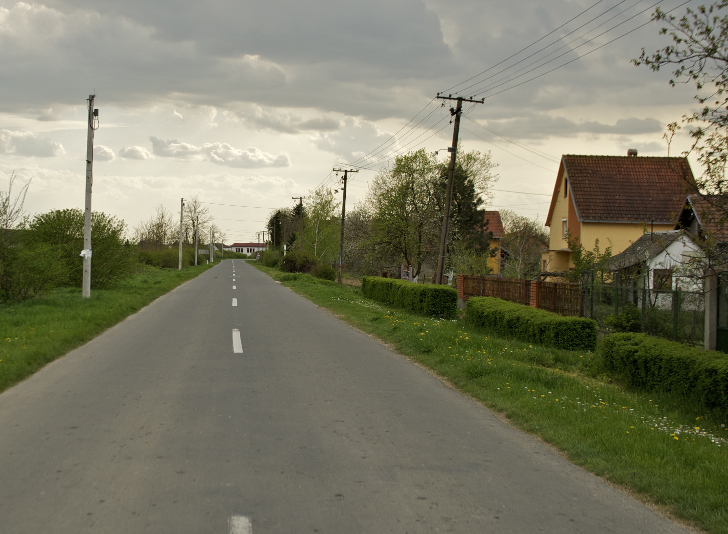 Обреж, у општини Пећинци, поред специјалног резервата Обедска бара